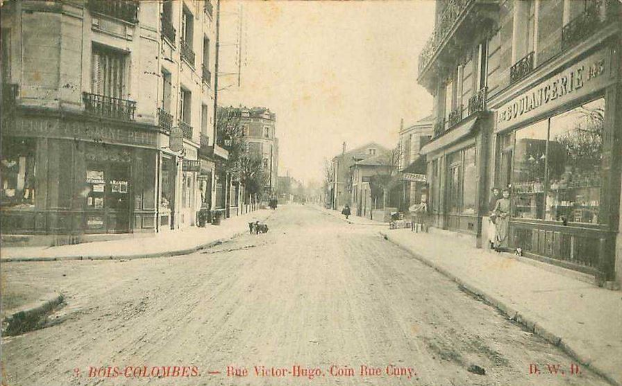 La rue Victor-Hugo au coin de la rue Cuny à Bois-Colombes